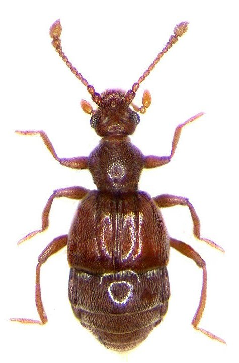 Familie: Pselaphidae Grösse: 1,6-1,8 mm Verbreitung: Europa, Nordafrika Ökologie: in Feuchtgebieten Fundort: Germania, Bayern, Oberfranken, Selbitz leg. det. U.Schmidt, 2007 Foto: U.Schmidt, 2008